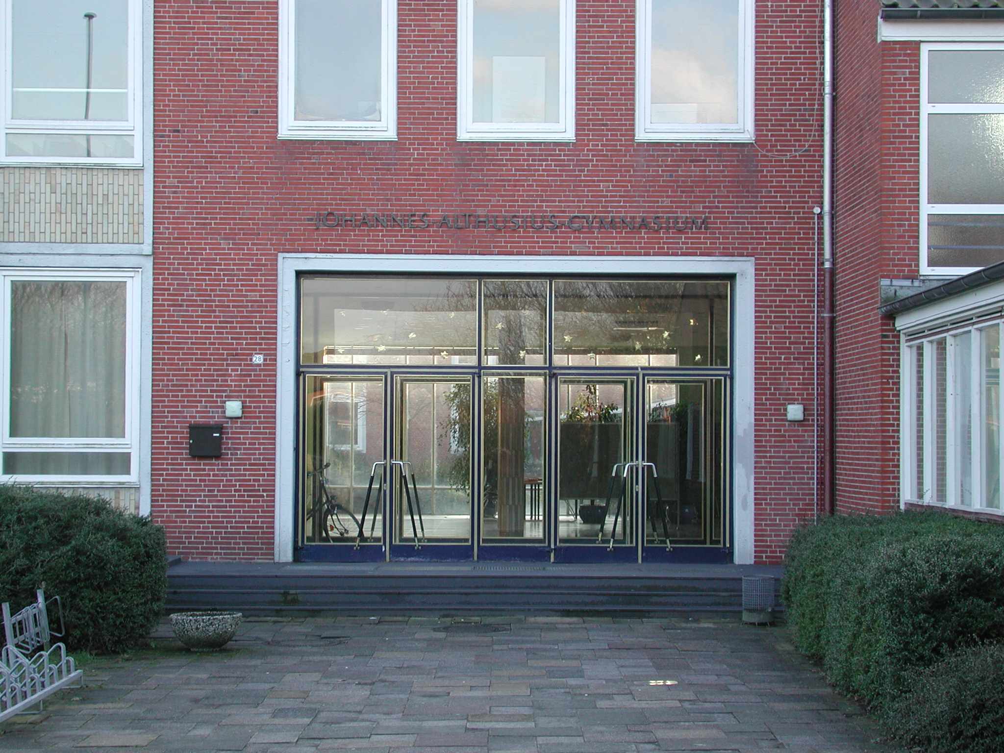 Haupteingang des Johannes-Althusisus-Gymnasiums Emden